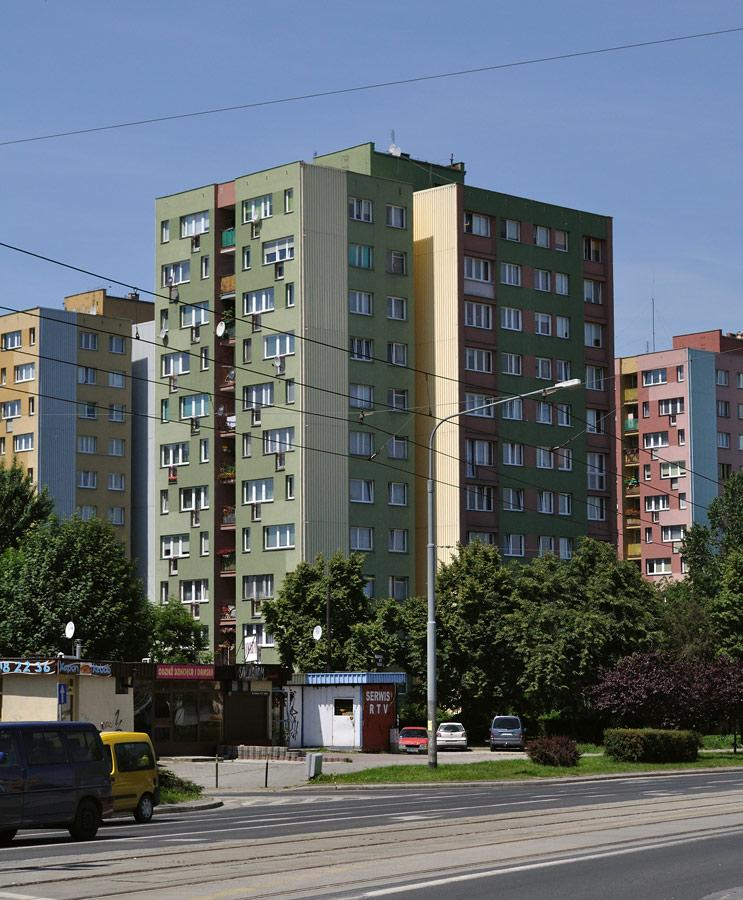 Hubska 123.